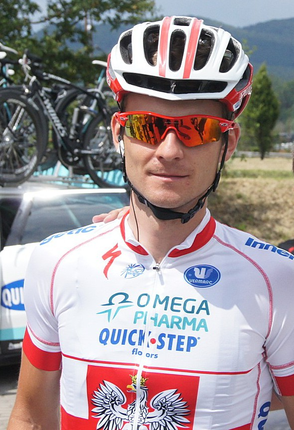 Michał Gołaś during Tour de Pologne 2012.